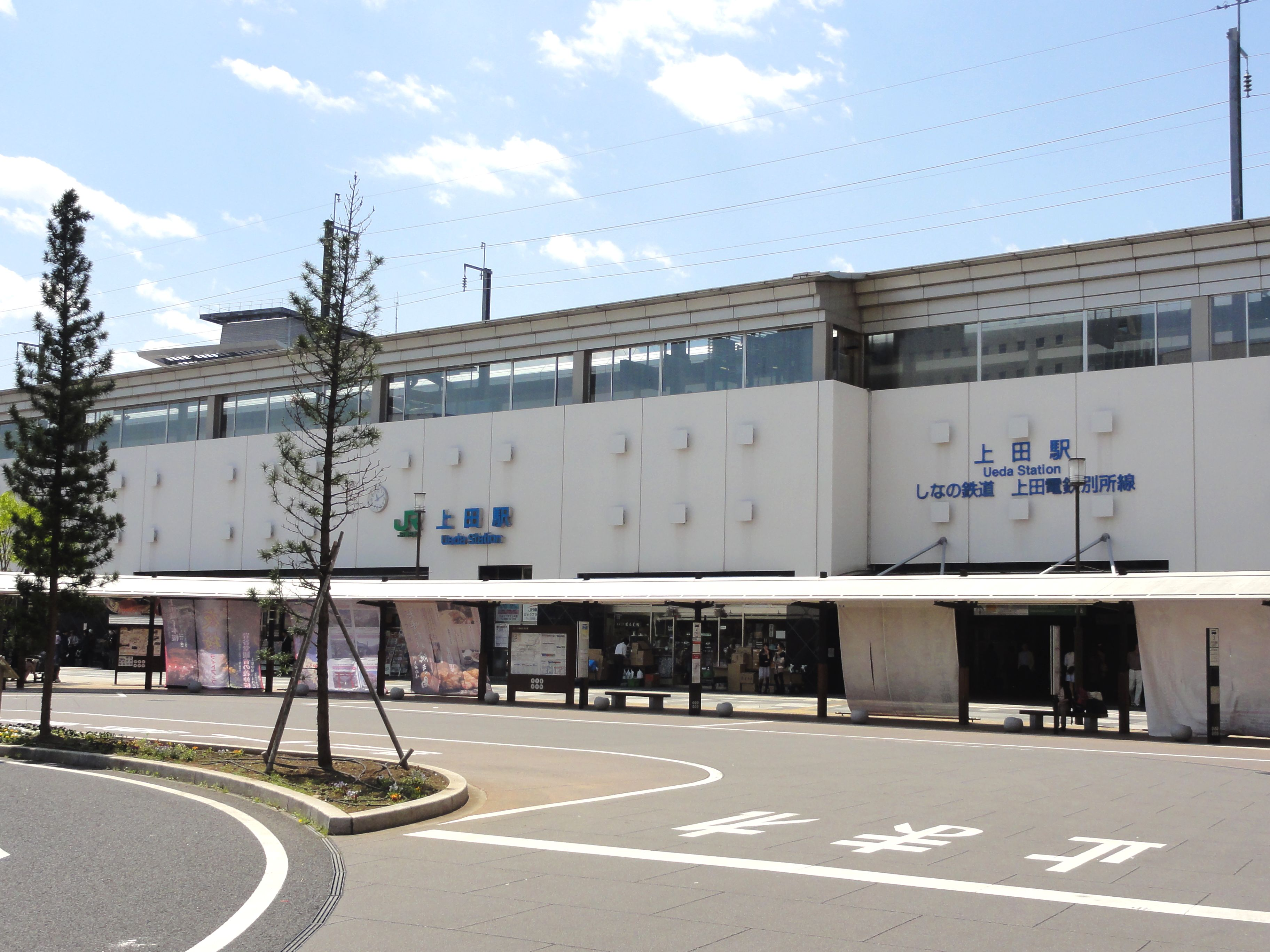 上田駅 お城口